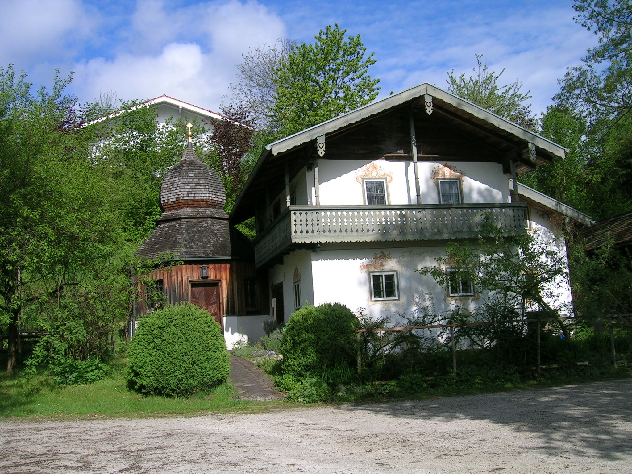 Frauenbrunnkapelle Traunwalchen This is a photograph of an architectural monument.